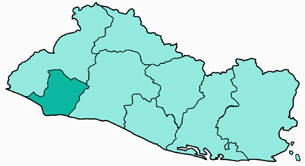 Mappa della diocesi cattolica di Sonsonate, in El Salvador. Lavoro personale eseguito a partire da questa immagine di Commons. Fonte per i confini delle diocesi